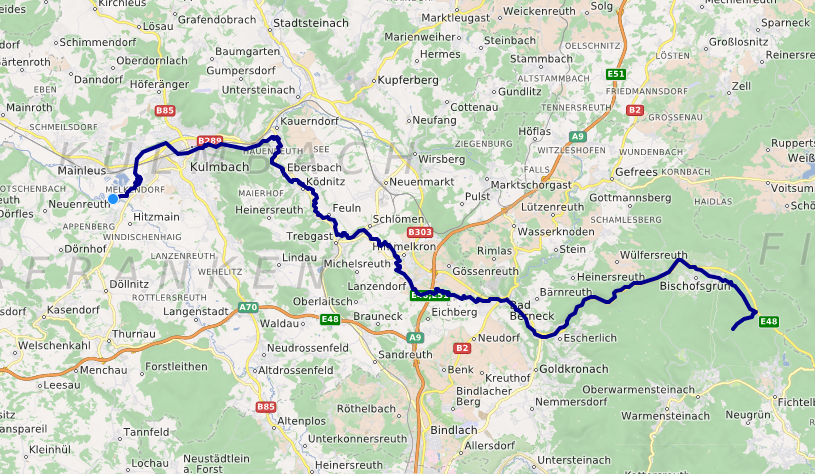 carte réalisée sur umap This map may be incomplete, and may contain errors. Don't rely solely on it for navigation.